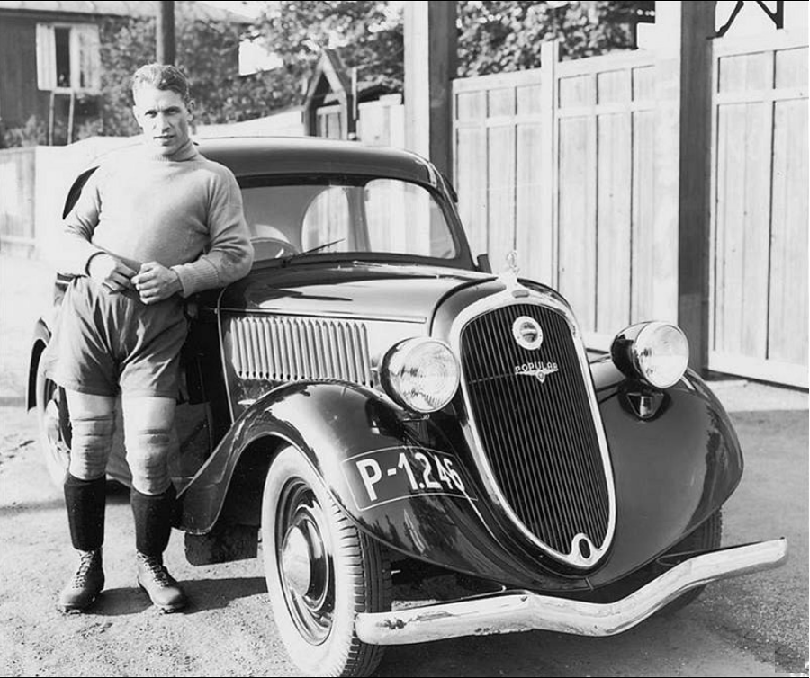 Škoda Popular a brankář SK Slavia František Plánička, který s klubem prožil jeho meziválečnou slávu.